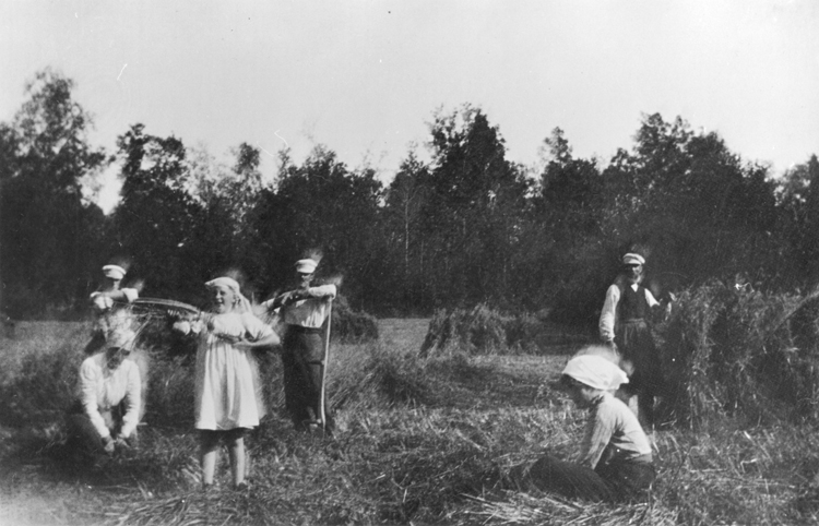 Skördearbete vid torpet Hummelmora, Viksjö, Järfälla. Torpet låg under Viksjö gård. Torpet var bostad för tegelslagare och skogvaktarboställe under senare delen av 1700-talet. Används idag som sommarbostad. Stående 2:a från vänster i förgrunden Iris Malmström.